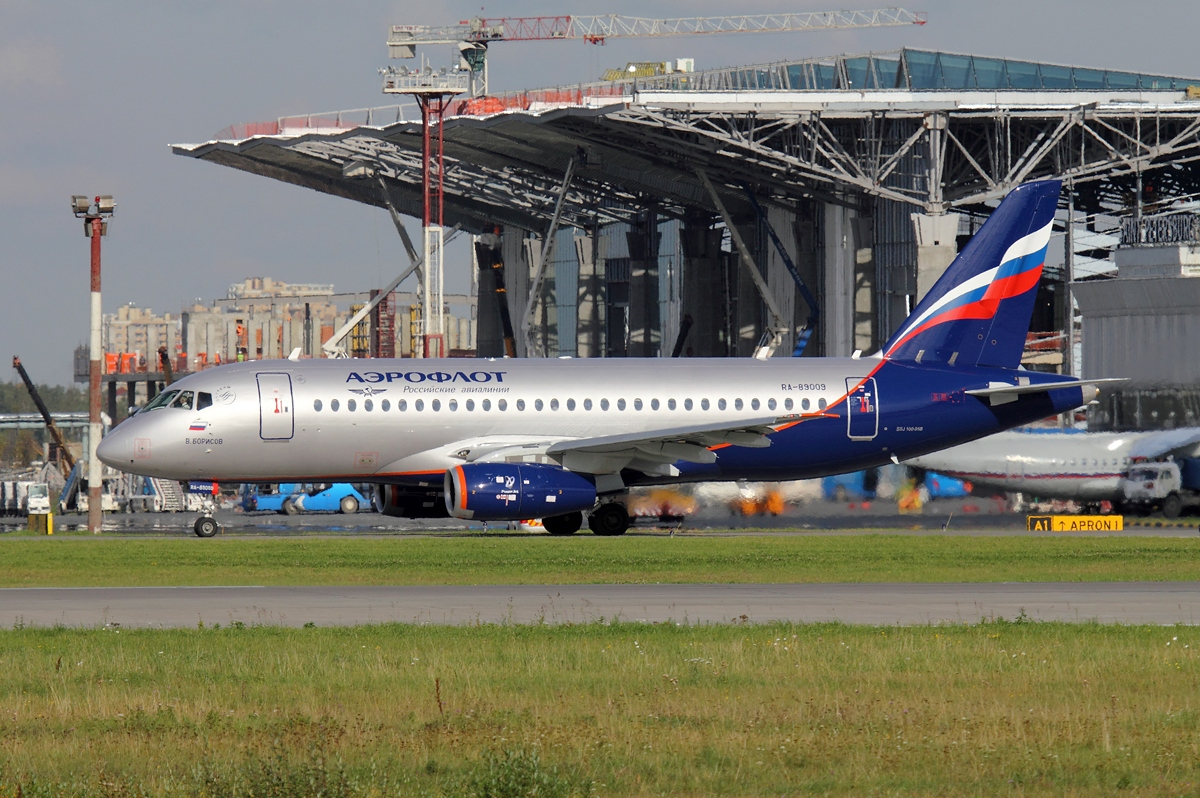 Aeroflot Sukhoi Superjet 100-95